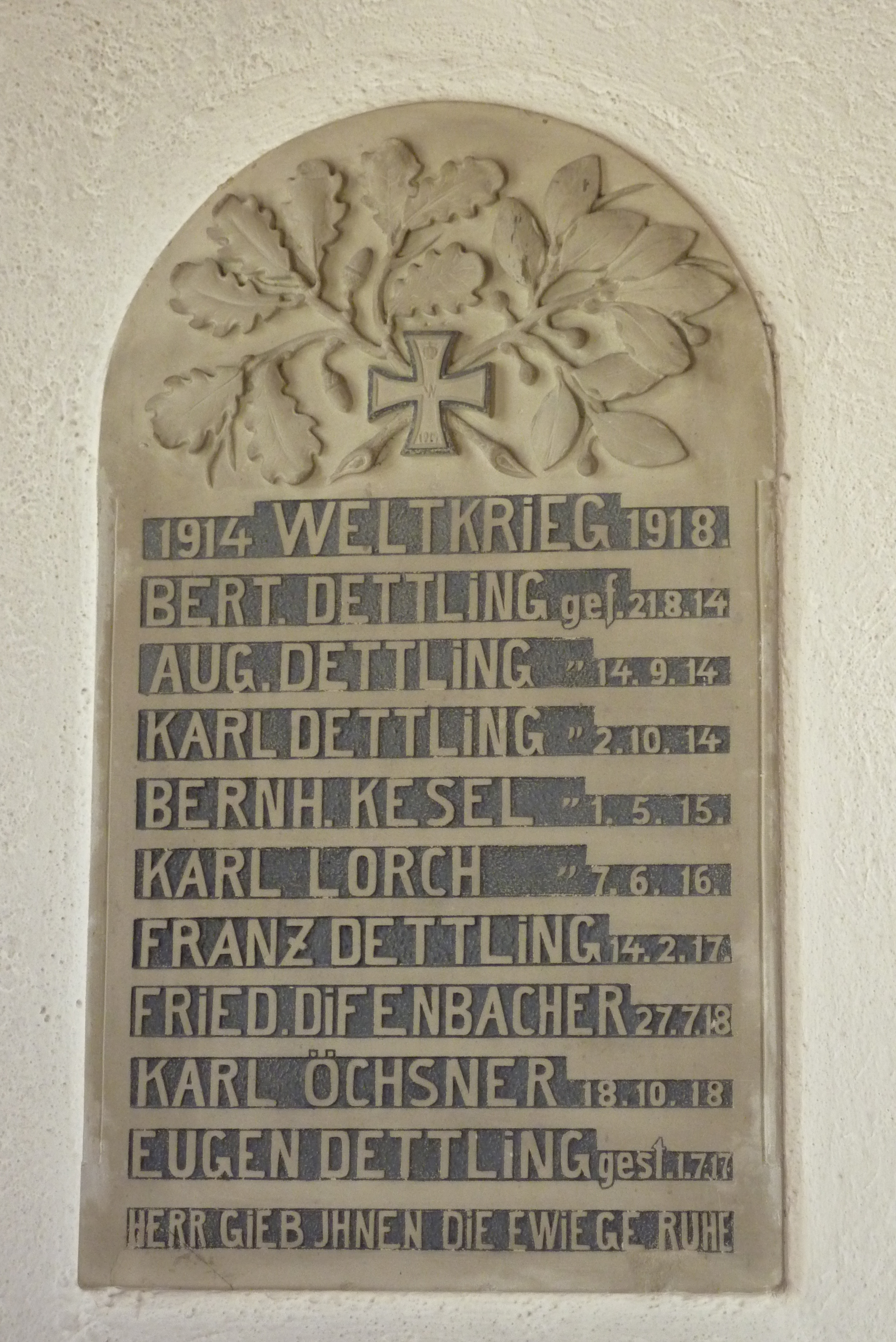 Kapelle Mariä Schmerzen (Mühlbach), Kriegerdenkmal im Vorraum